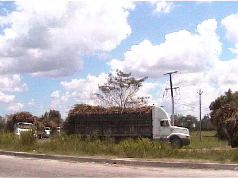 Zuckerrohrernte in Orange Walk